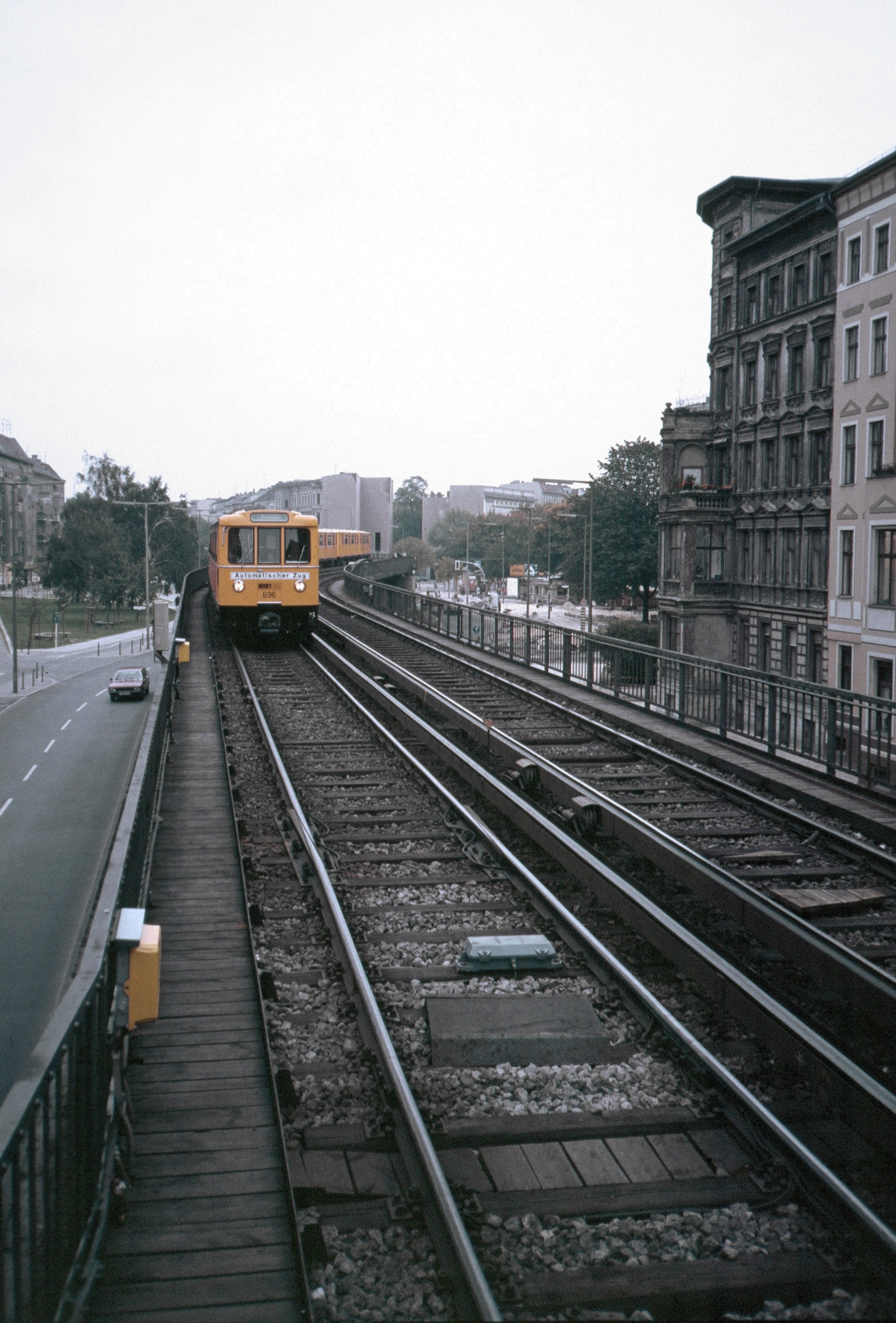 Doppeltriebwagen Baureihe A 3L des automatischen Betriebs der U4, eingestellt in einen Zug der U1 bei der Einfahrt in den U-Bhf. Görlitzer Bahnhof